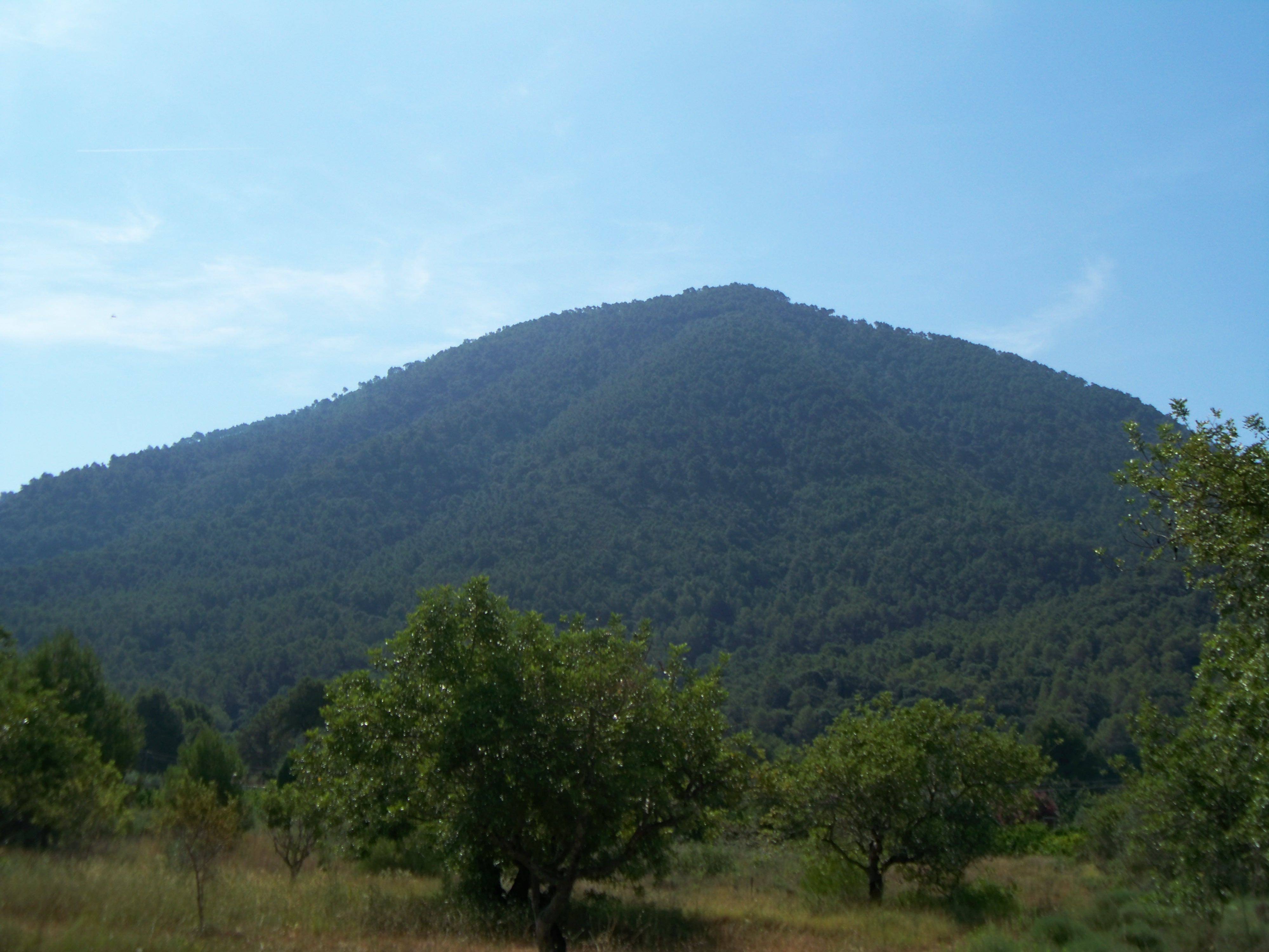 El Montí desde la partida municipal de "Carbonària".